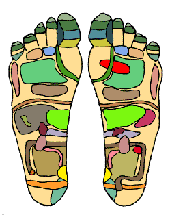 conforme Licensing Image:Foot Chart1 small.png